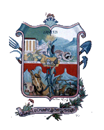 Escudo del municipio sonorense.